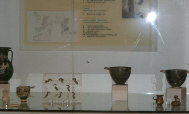 reperti archeologici risalenti al IV secolo a.C. conservati presso il museo archeologico comunale di Villa Castelli